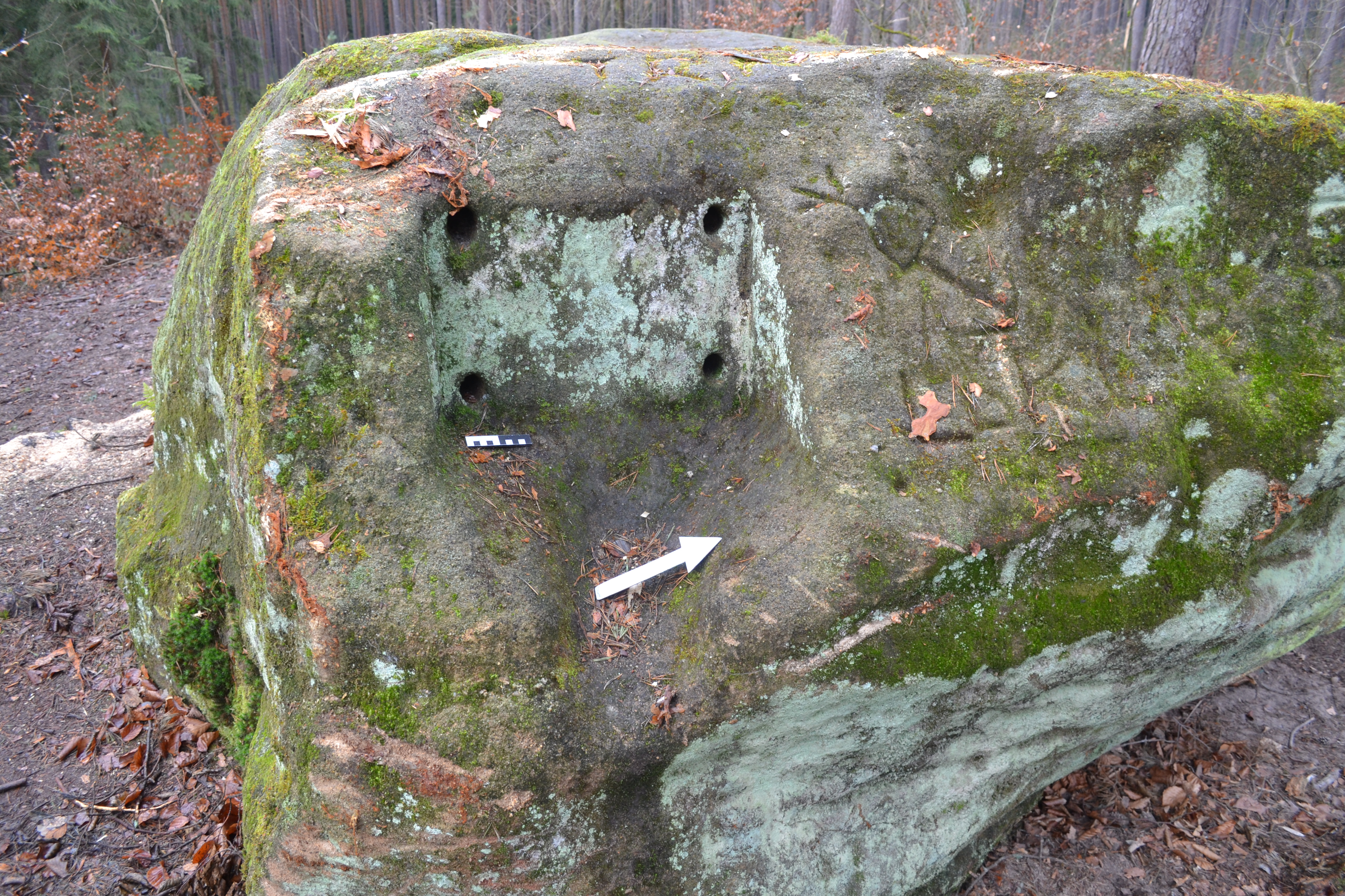 Aufnahme mit Maßstab und Nordpfeil